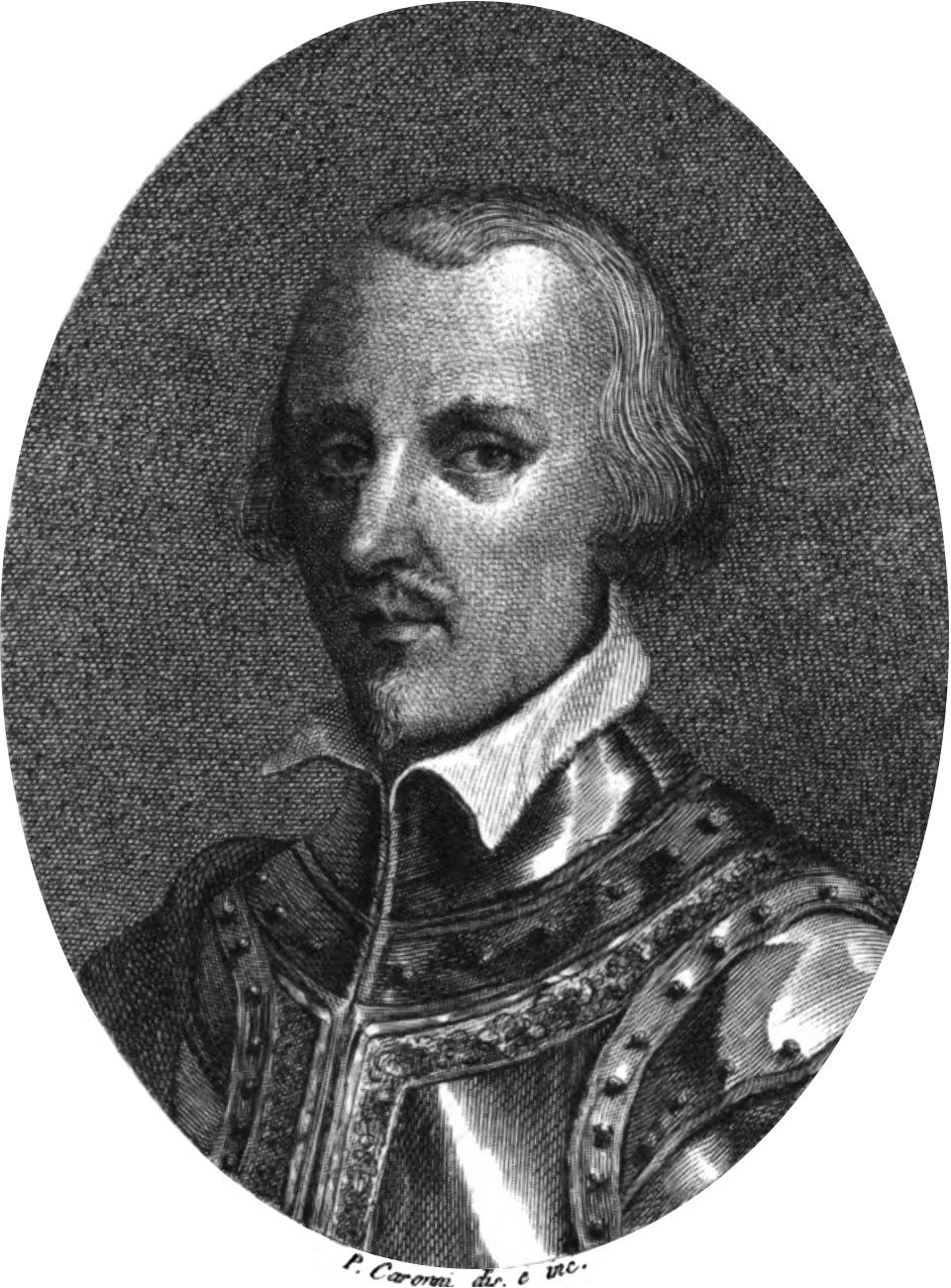 Ritratto di Arrigo Caterino Davila